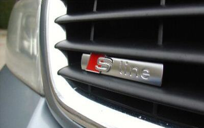 Audi S-line logo